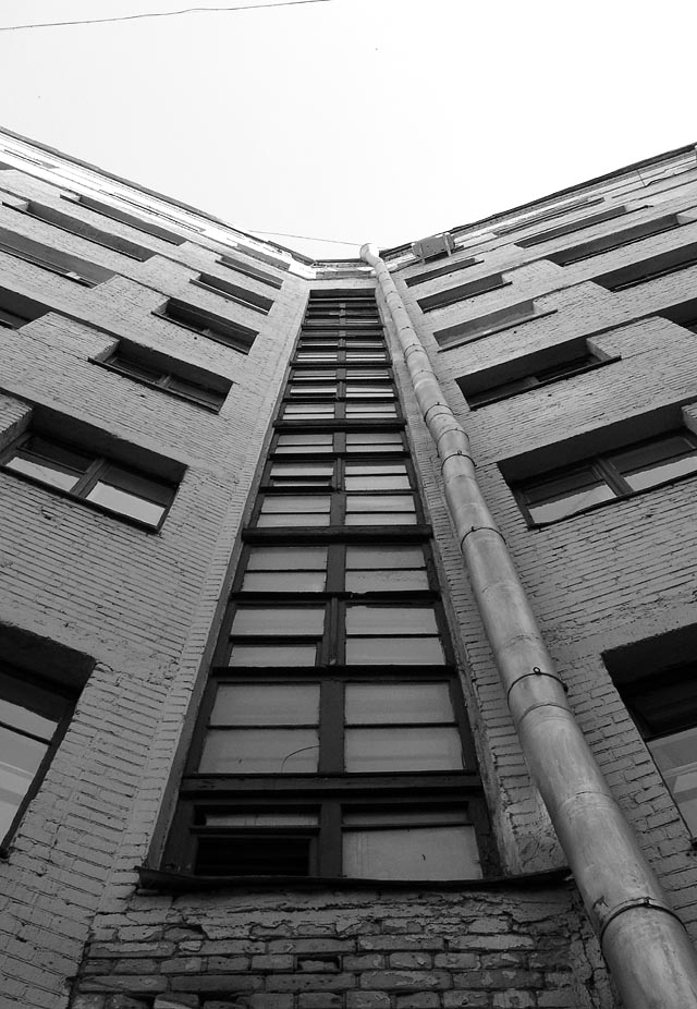 15, Sivtsev Vrazhek Street, Moscow